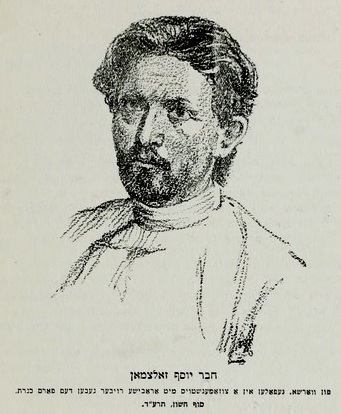 ציור של יוסף זלצמן שהופיע בספר באידיש צום אנדענקען די געפאלענע וועכטער און ארבייטער אין ארץ ישראל שיצא בשנת 1916 ותורגם לאחר מכן לגרמנית ו איורים מאת הצייר והפעיל הסוציאליסט מיטשל לובּ Mitchell Loeb (1887 - 1968)